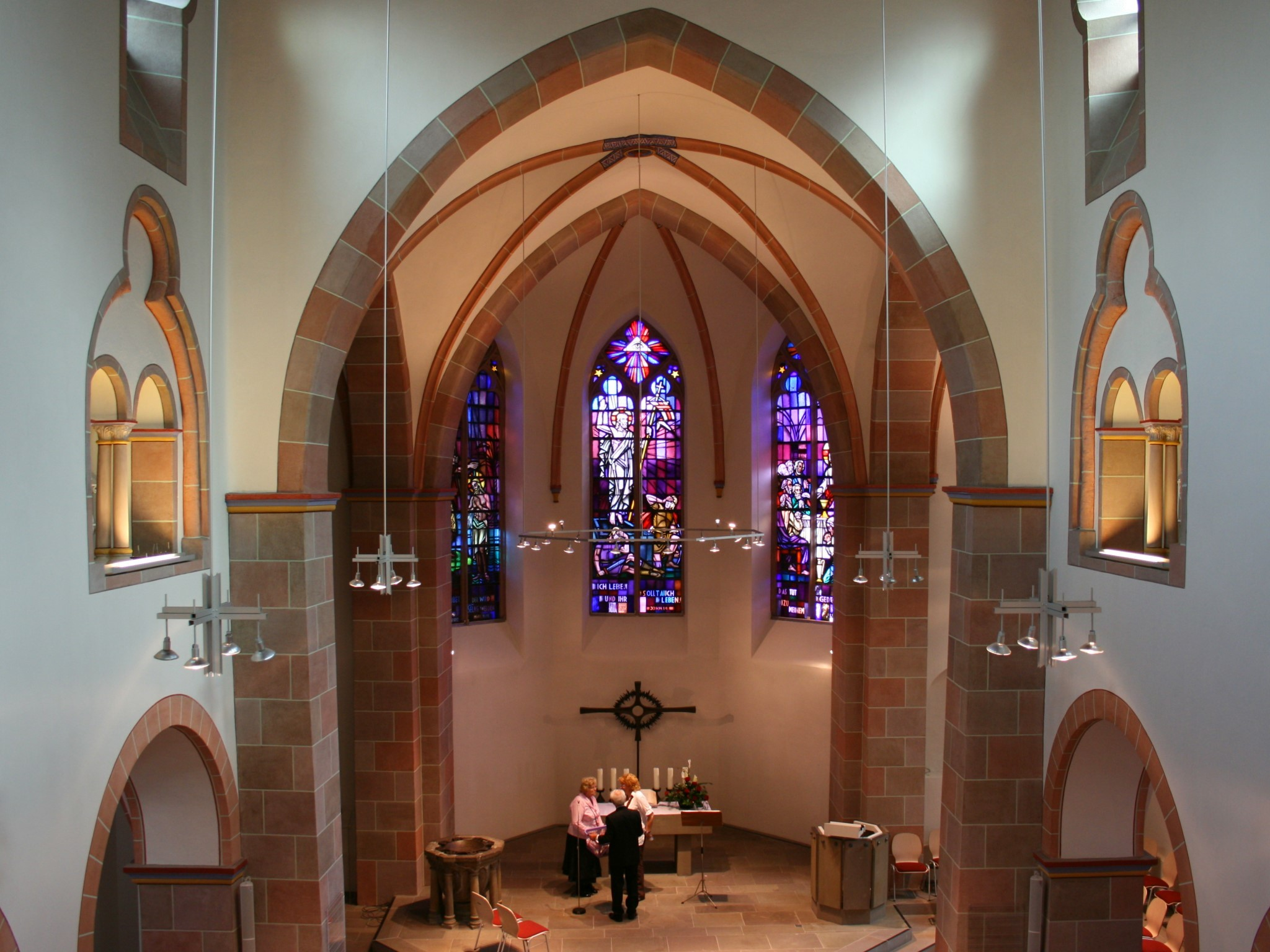 Jesus-Christus-Kirche in Meinerzhagen